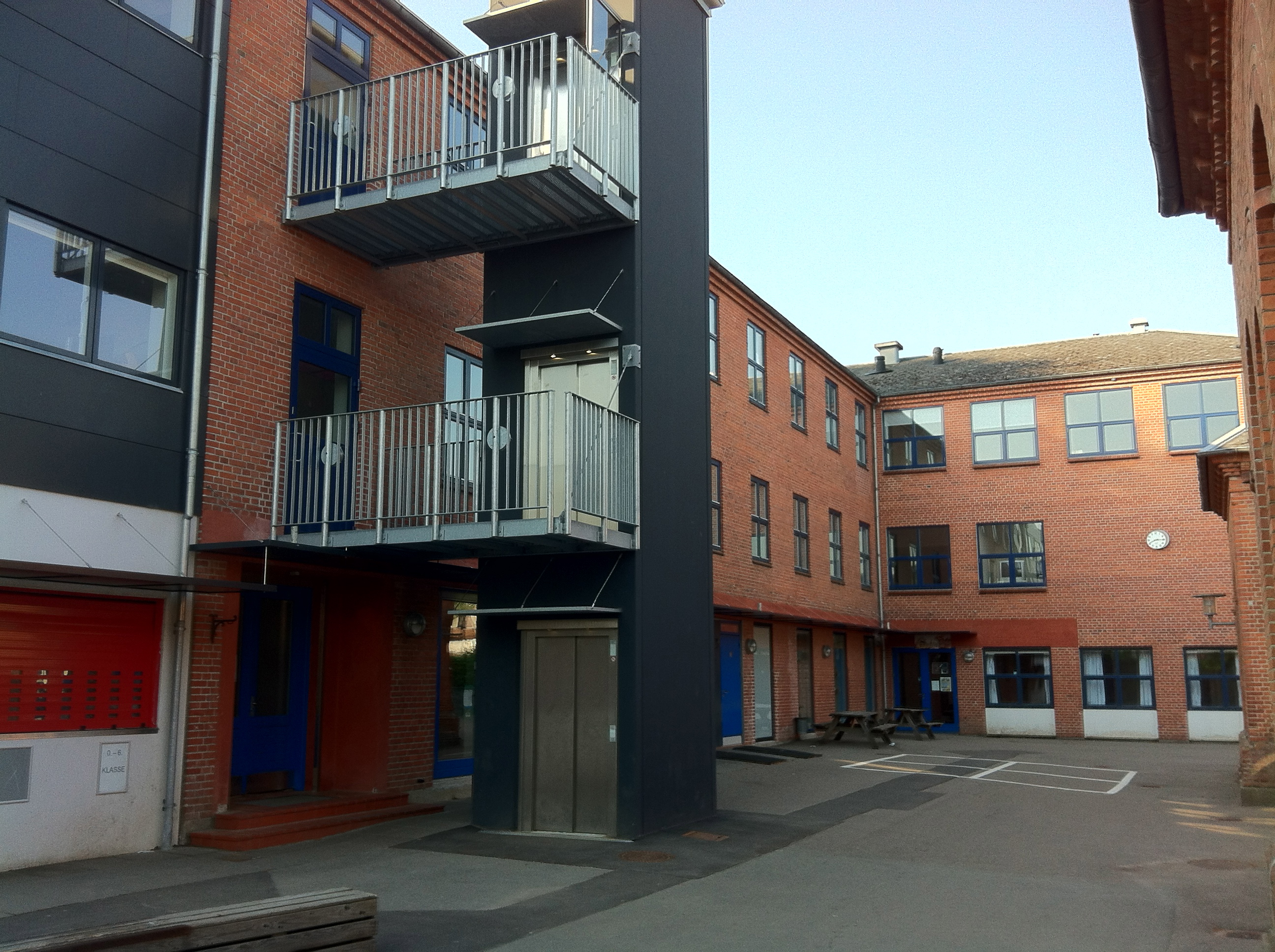 Rathlouskolens skolegård samt elevator.